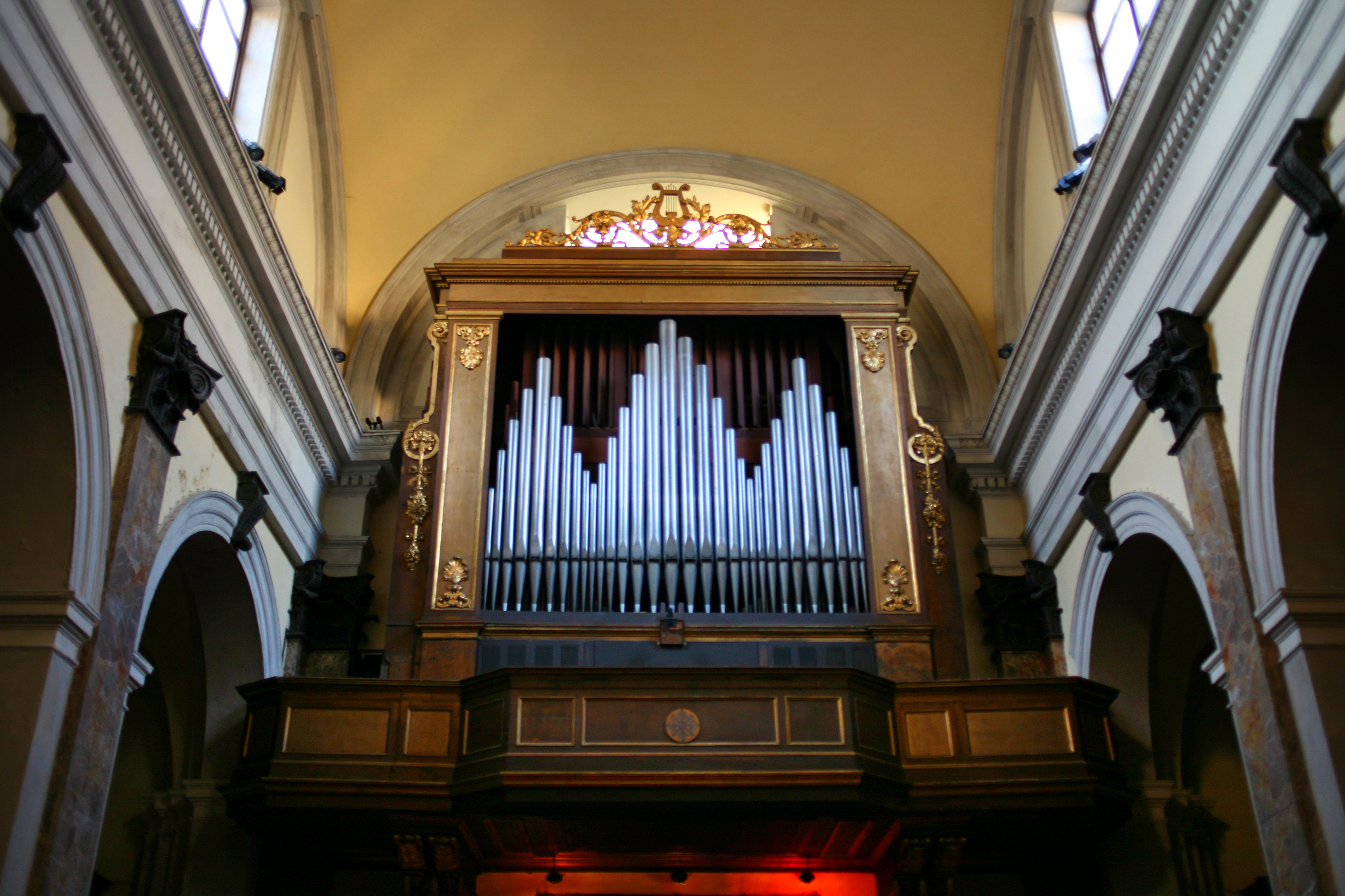 Organo maggiore Balbiani Vegezzi-Bossi di San Giorgio al Palazzo, Milano (1936)